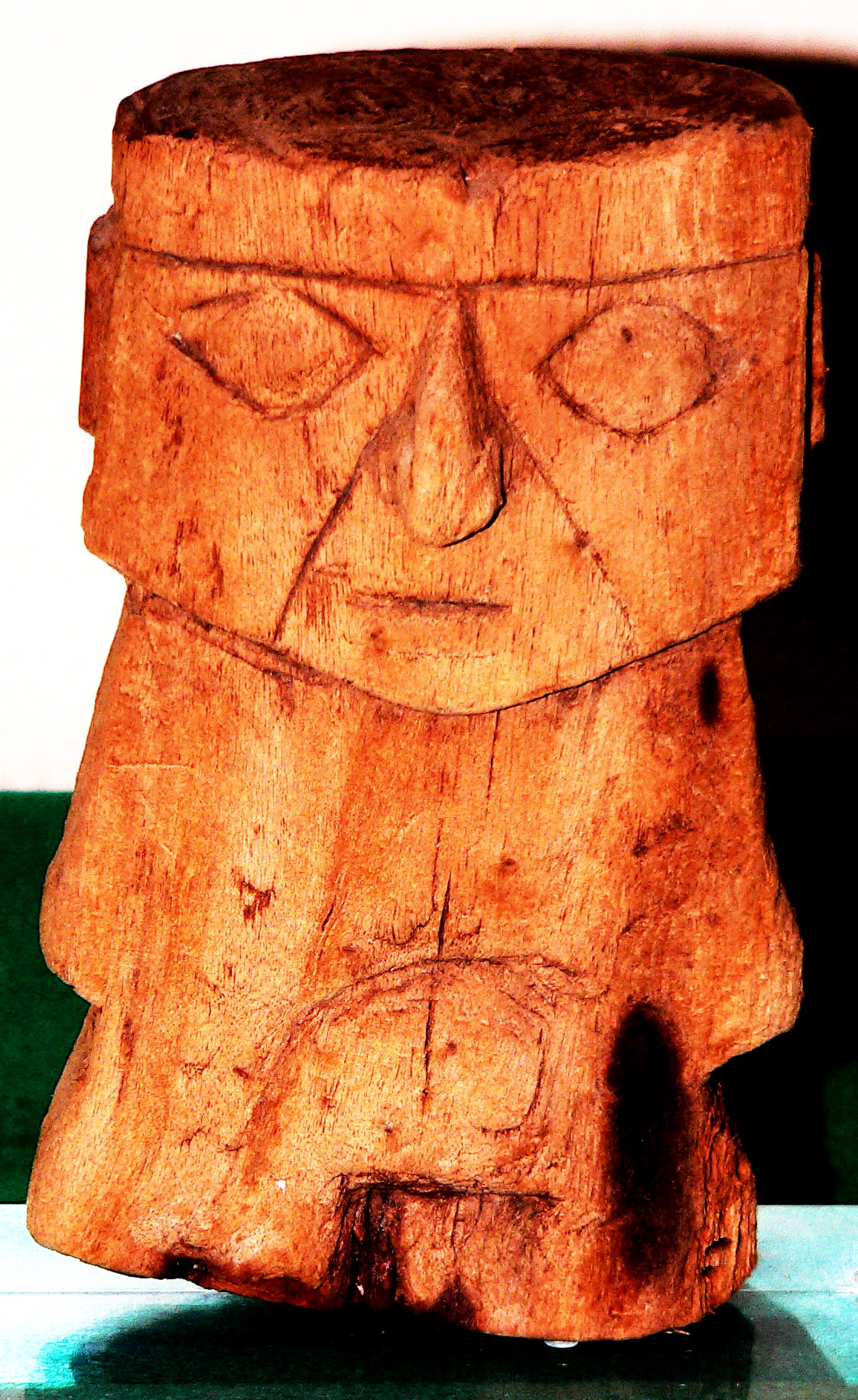 Descripción: Idolo de madera Antigüedad: Entre 1.200 y 1.470 d.C Cultura: Cultura Chancay País : Perú Fotógrafo: © Manuel González Olaechea y Franco Fecha de la foto : 25 de abril de 2008